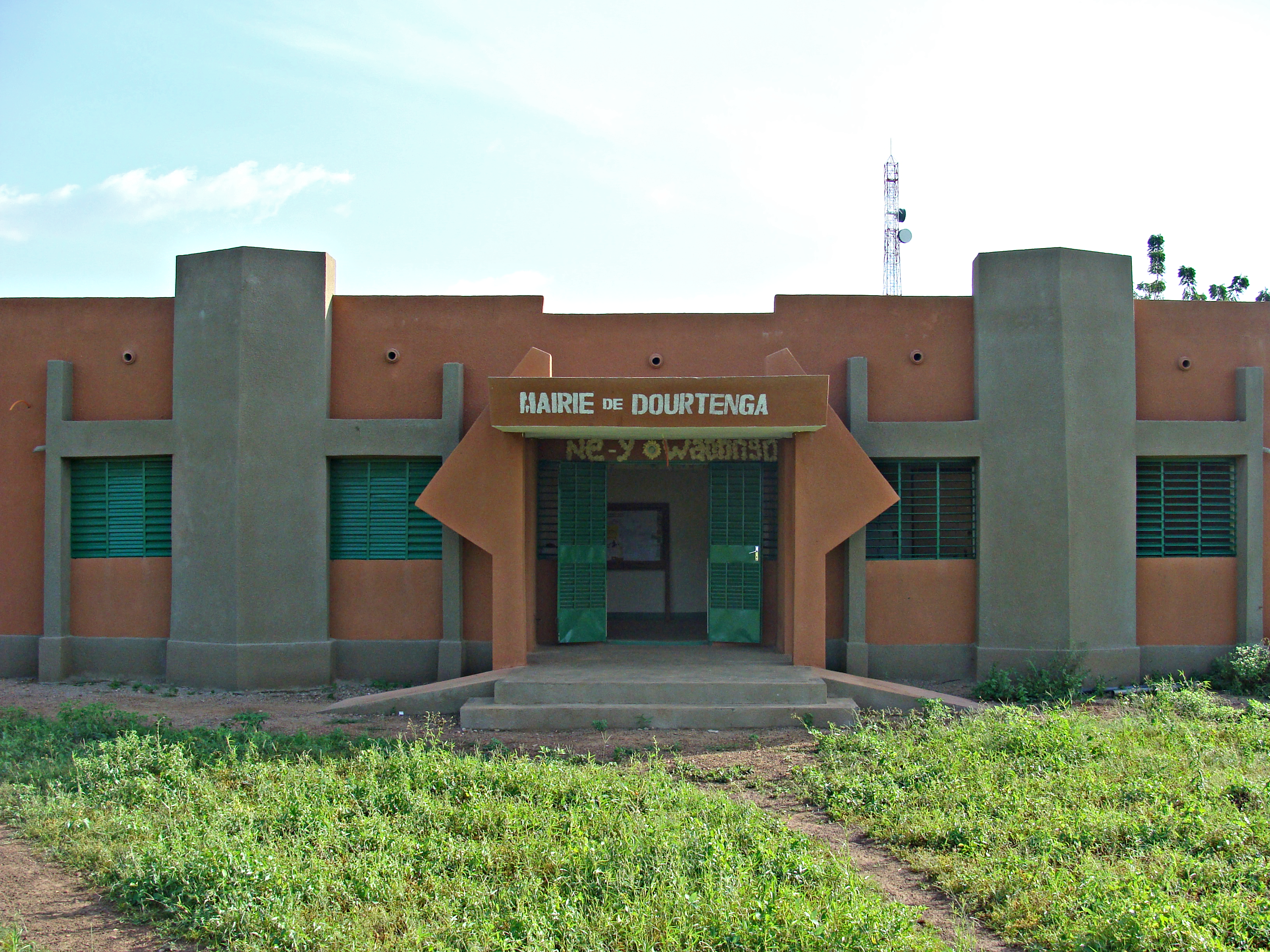 Burkina Faso: Rathaus von Dourtenga